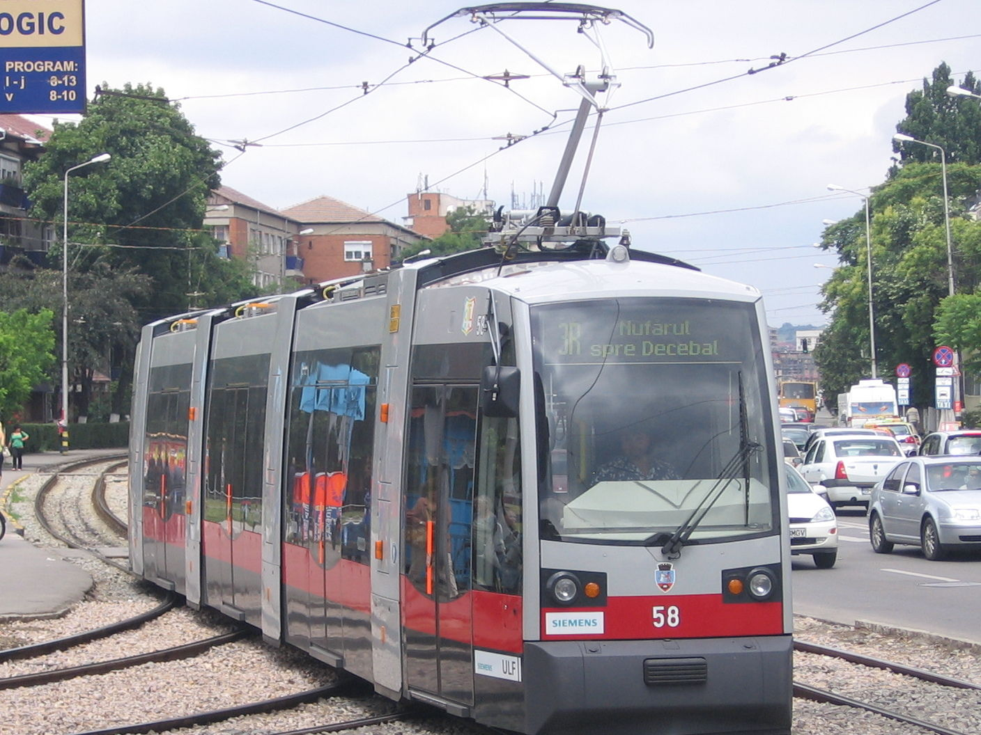 Tram Siemens ULF in Oradea on line 3R